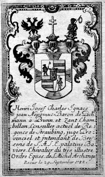 Wappenstich des Heinrich Joseph Karl Ignatz Johann Nepomuk Freiherr von Pechmann